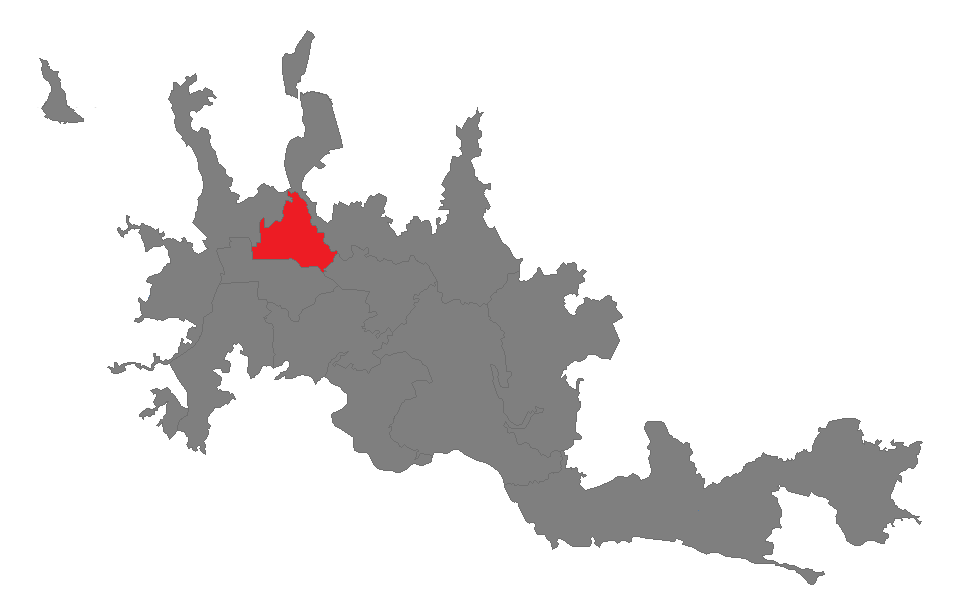 comuna san jose de manizales